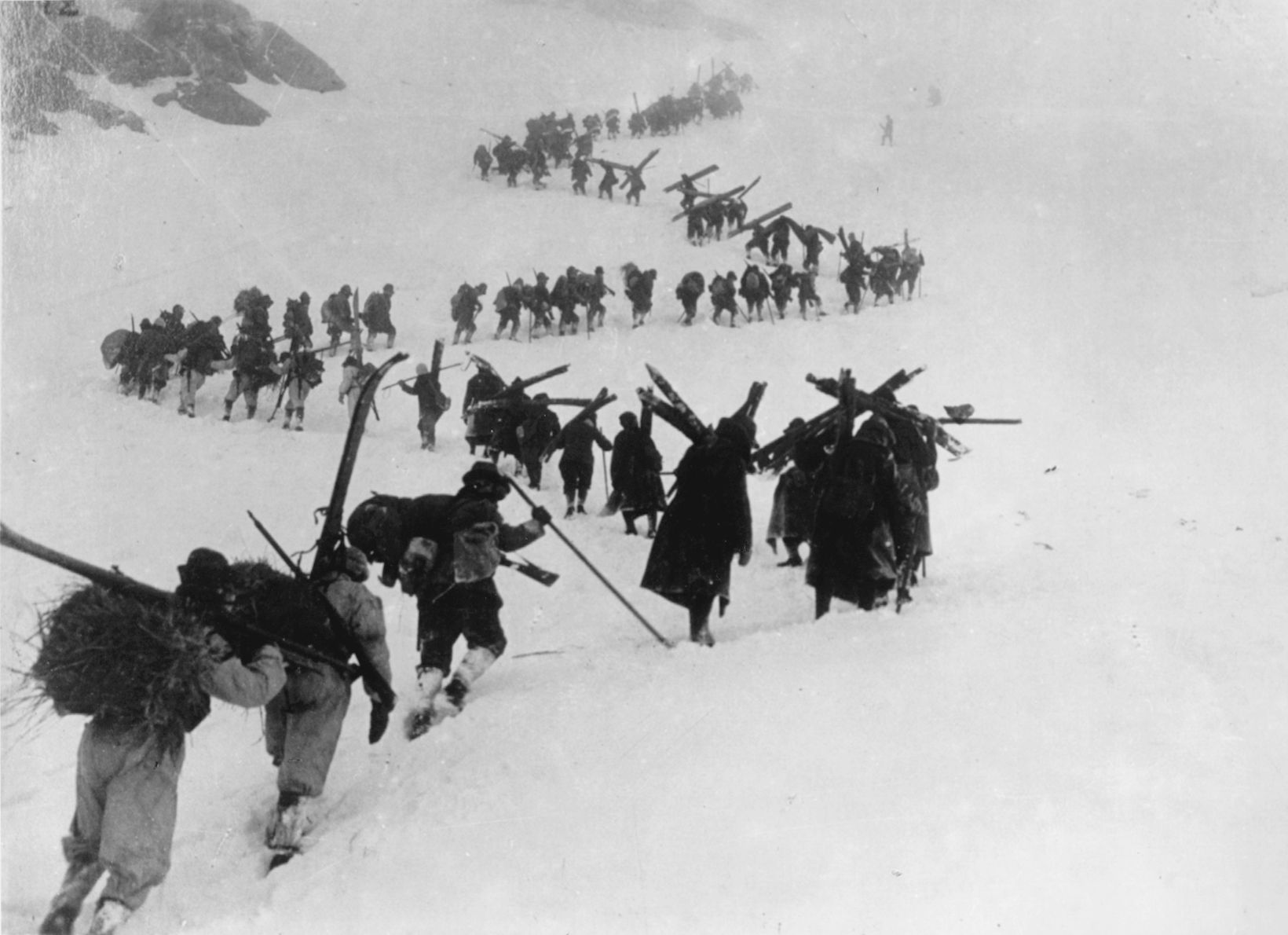 Prima Guerra Mondiale: i soldati d'Italia tra le vette delle nevi eterne